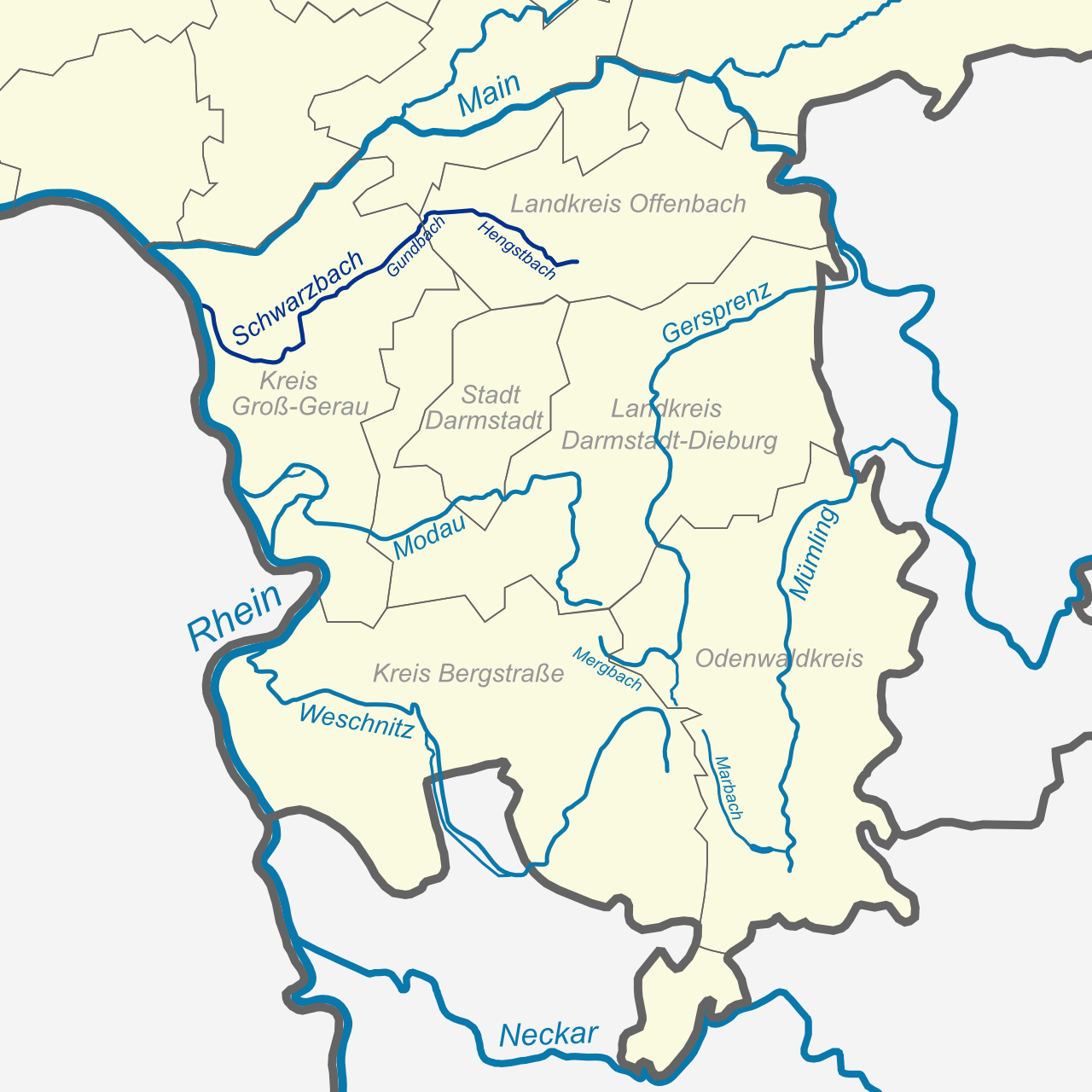 Verlaufskarte des Schwarzbachs in Südhessen